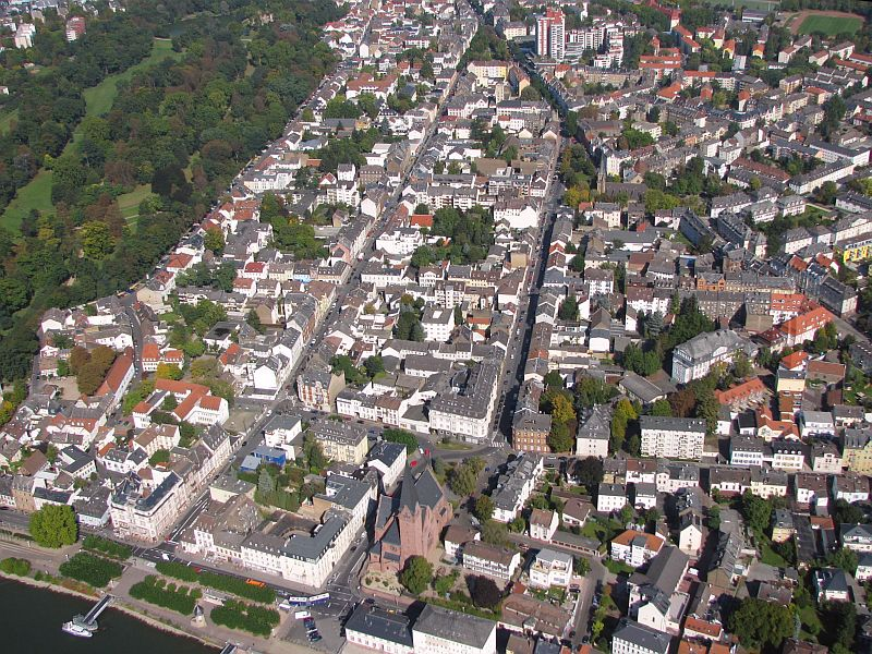 Luftbild Wiesbaden-Biebrich Rheinufer Schlosspark Rathausstraße Stettiner Straße Armenruhstraße St. Marien-Kirche Foto 2008 Wolfgang Pehlemann Wiesbaden IMG_0129